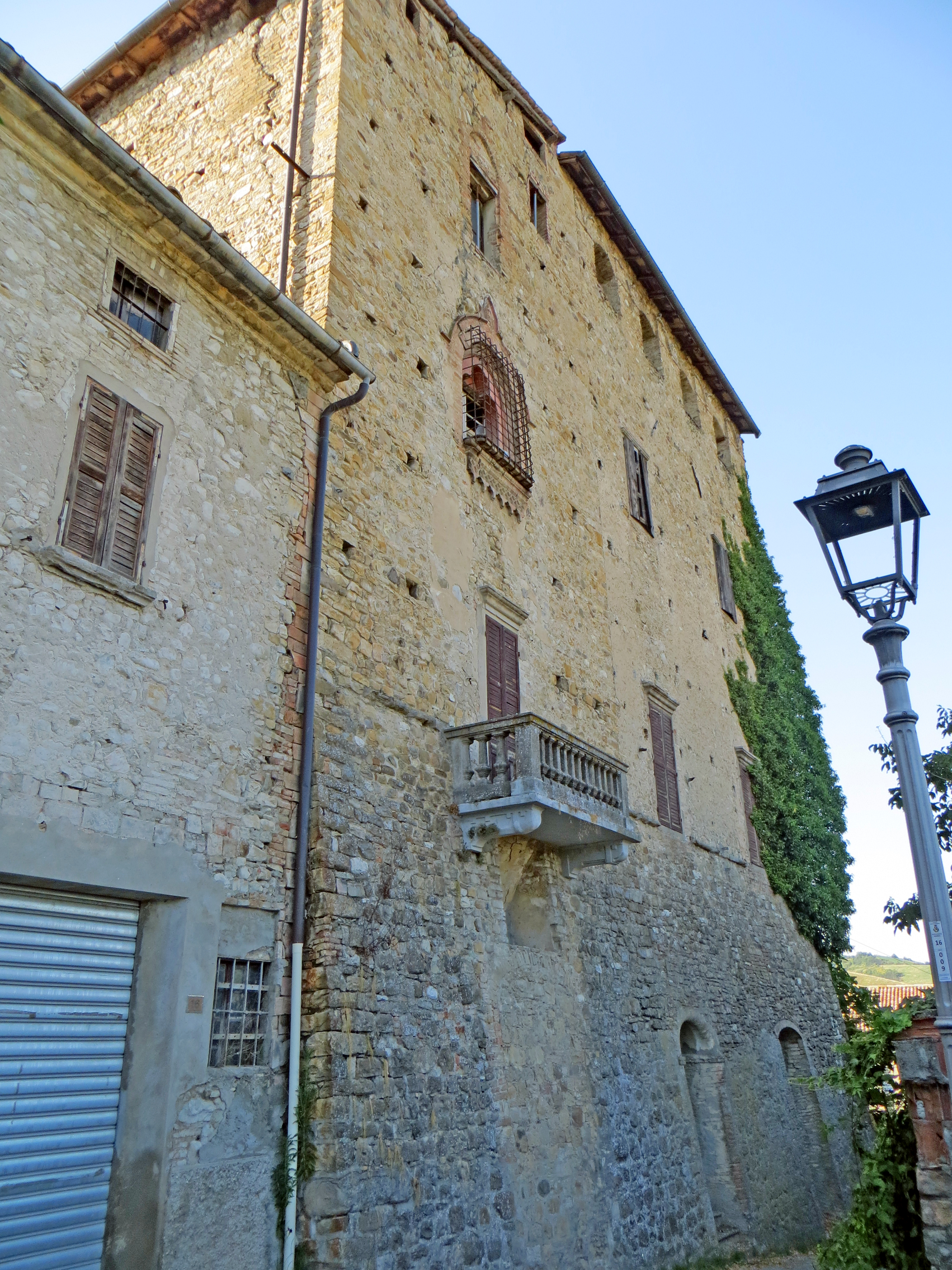 Castello (San Vitale Baganza, Sala Baganza) - corpo principale